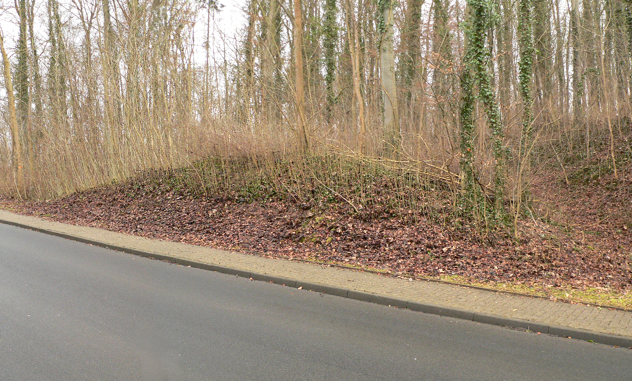 Walldurchschnitt durch Straße der Burg Friedland